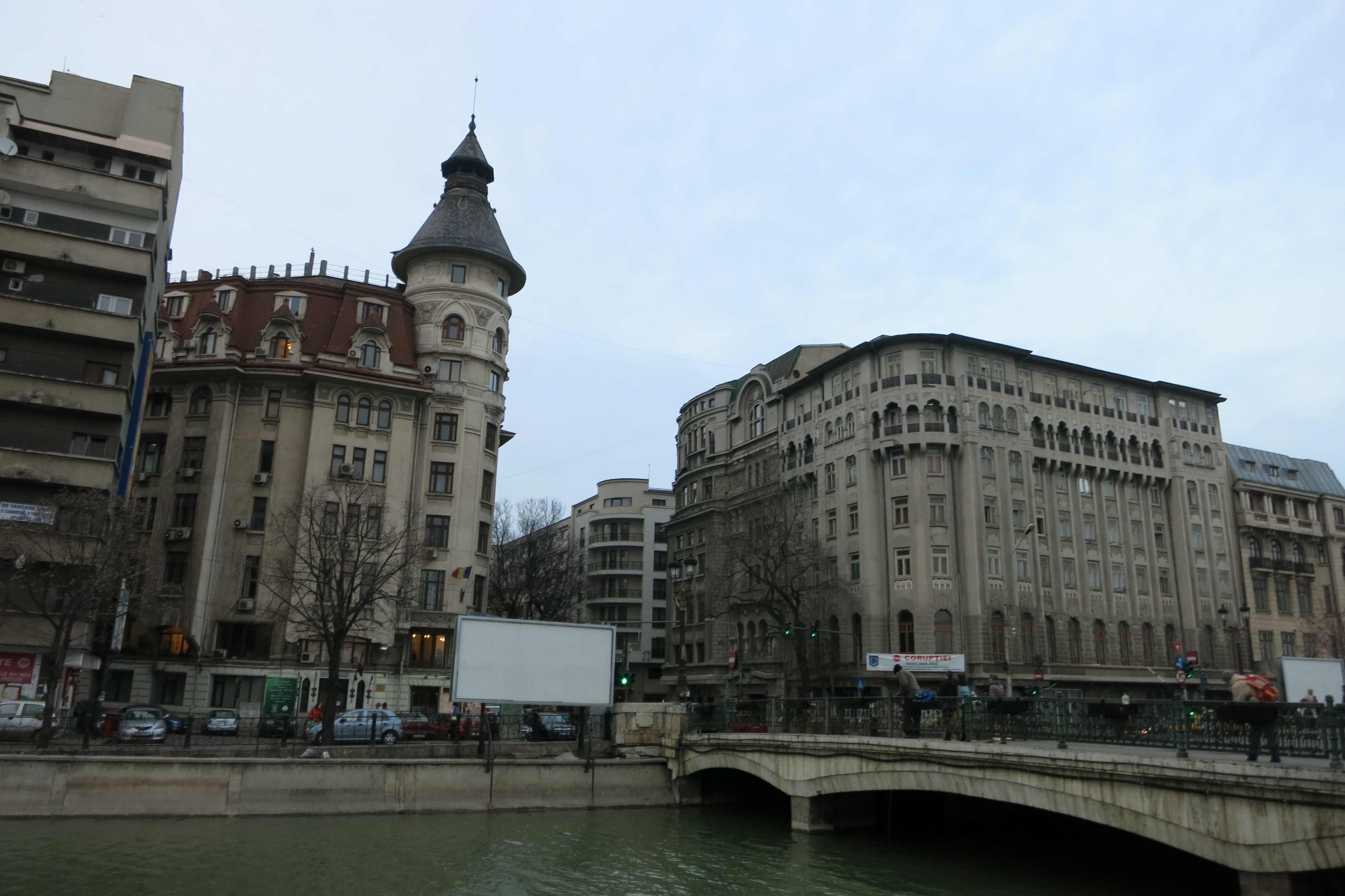 Sit III municipiul București Splaiul Independenței - Piața Unirii - Bd. Unirii - Bd. Libertății